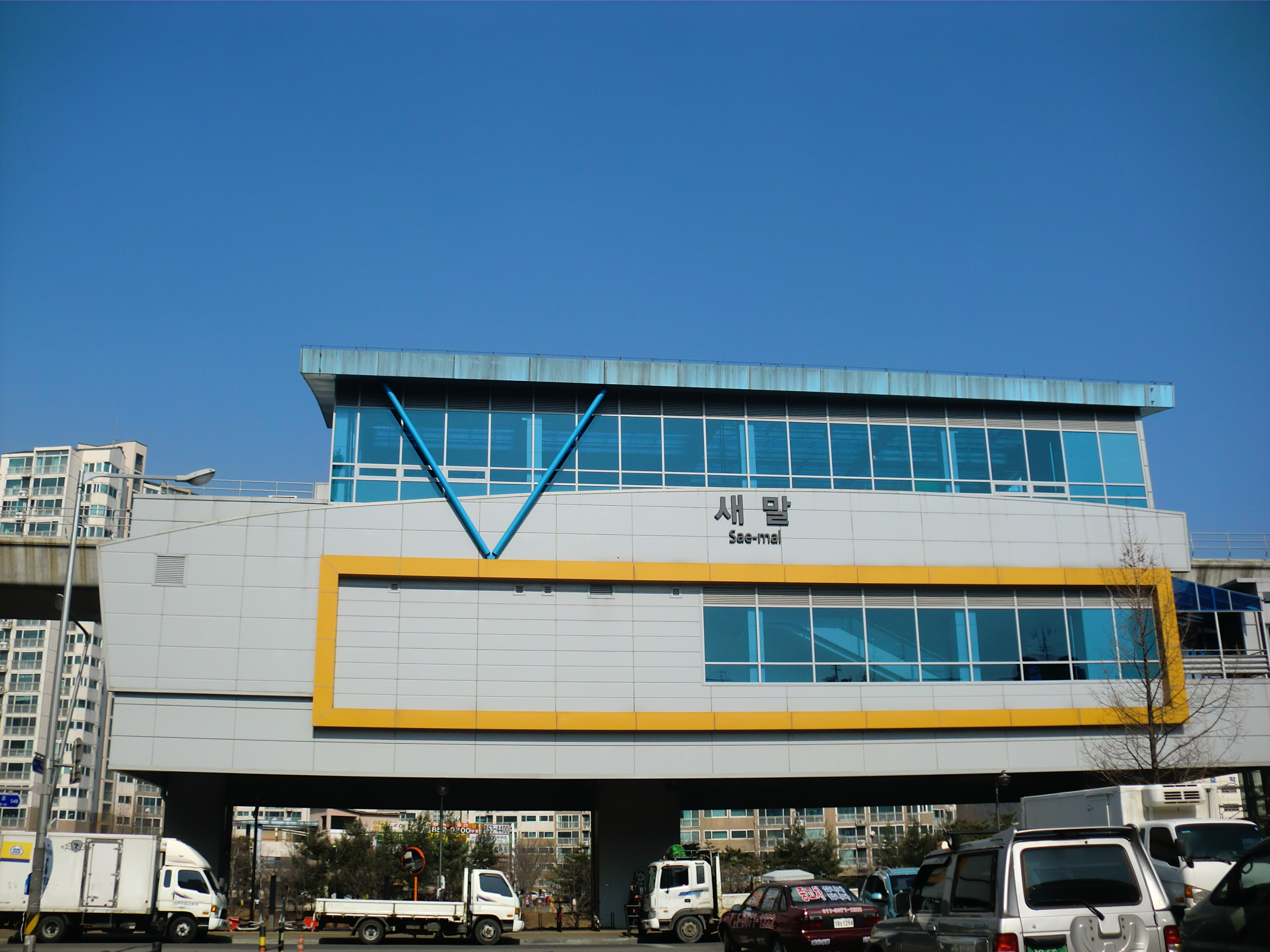 의정부경전철 새말역